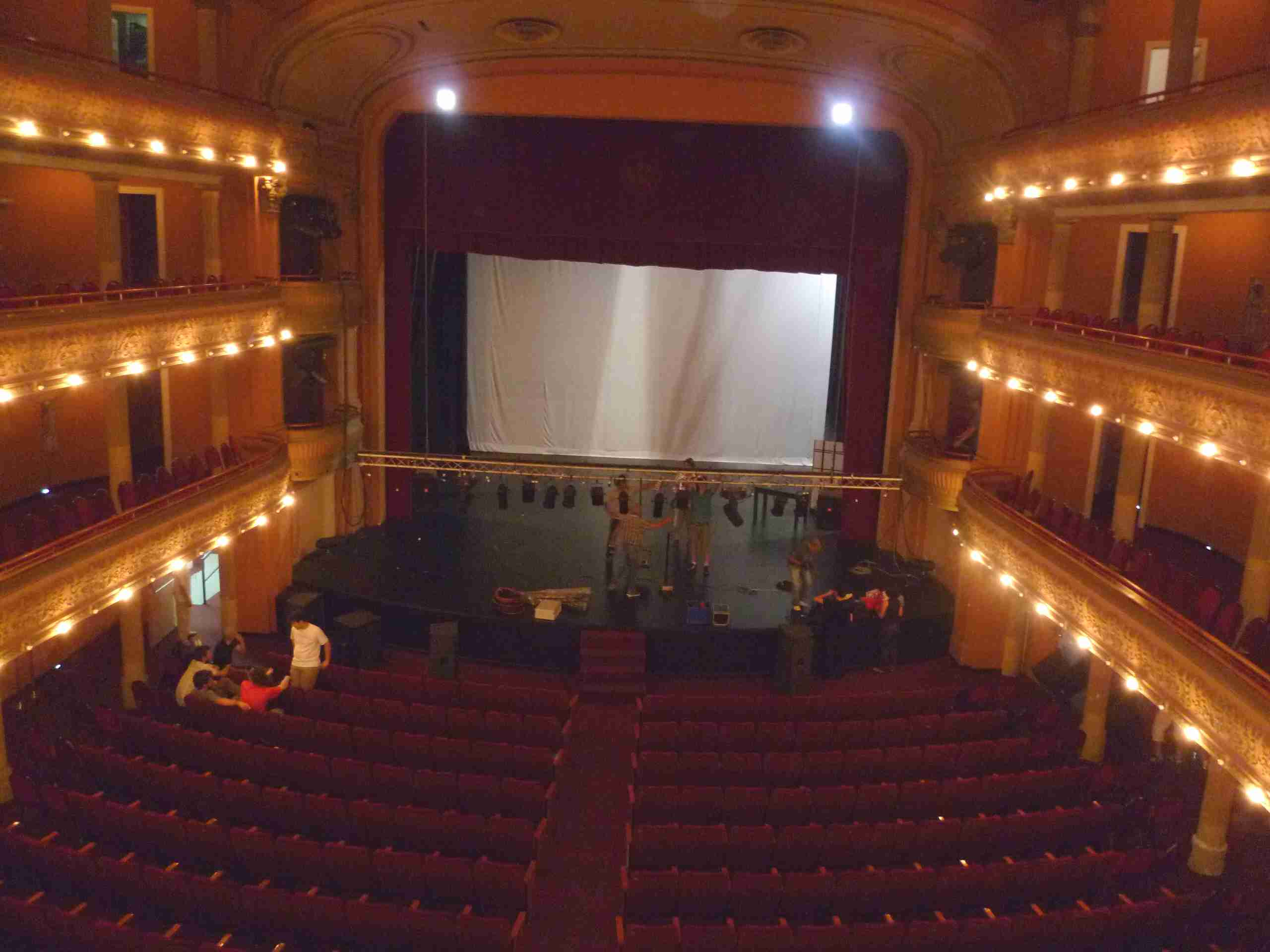 Sala Carlos Gimenez del Teatro Real - Ciudad de Córdoba. Capacidad aproximada: 700 personas